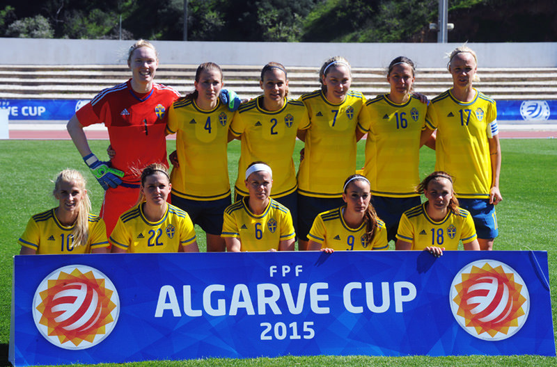 a_26_5815